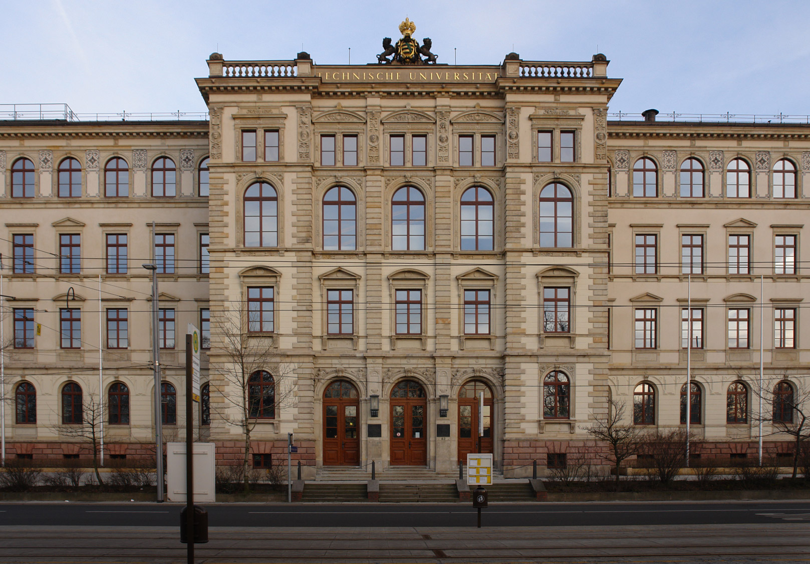 TU Chemnitz Eingang Hauptgebäude Strasse der Nationen